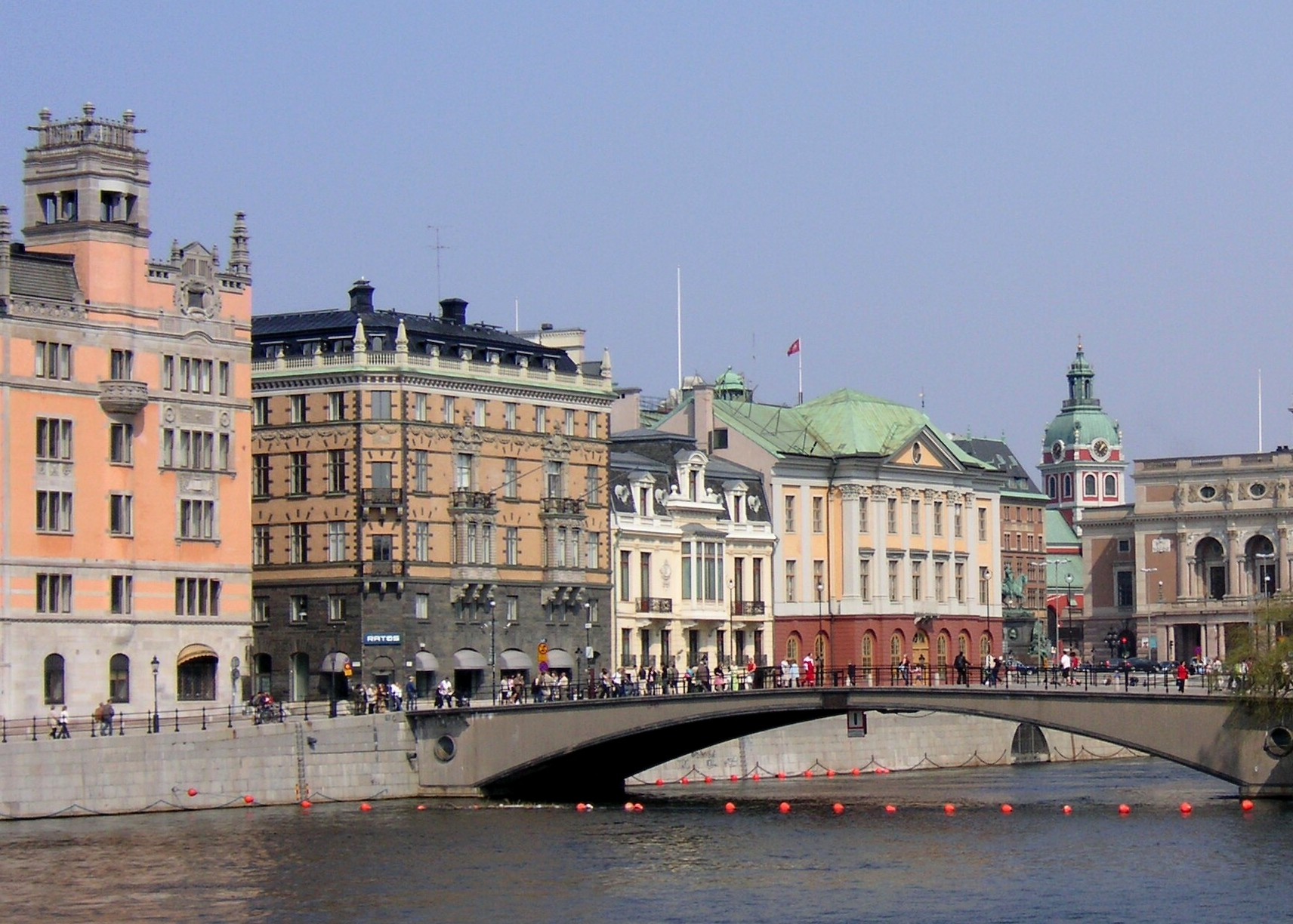 Riksbron i Stockholm med (fr.v.) Rosenbad, Adelswärdska huset, Sagerska palatset och Arvfurstens palats samt Operan